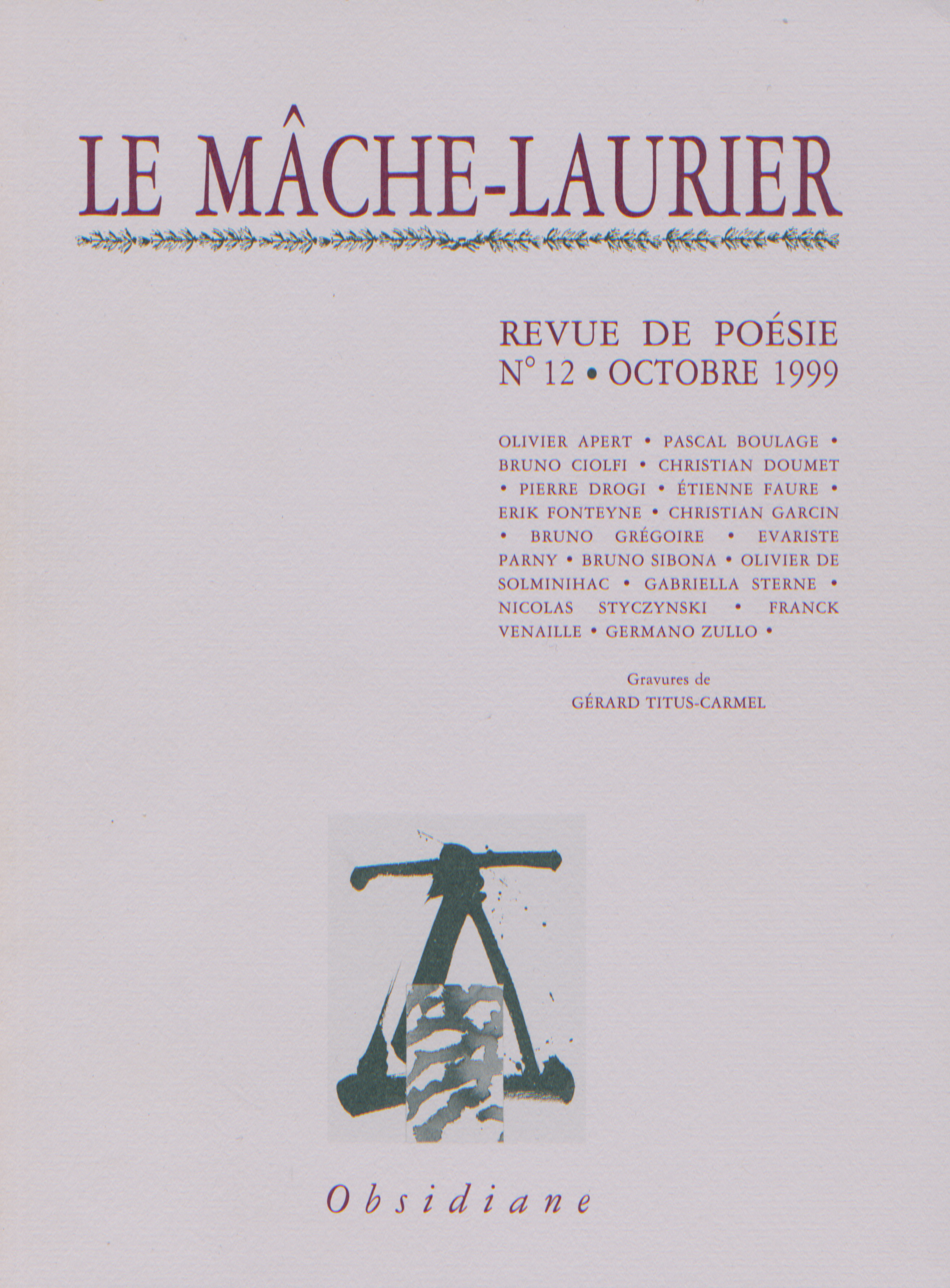 Le Mâche-Laurier n°12 octobre 1999